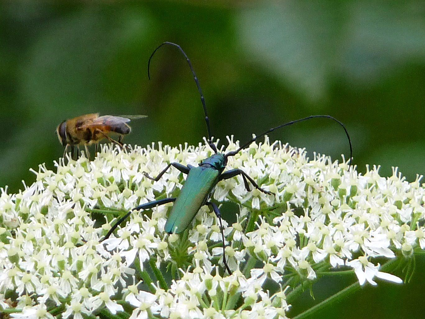 Moschusbock auf einer Doldenblüte bei Ludwigsthal am Großen Regen im Bayerischen Wald in einer Höhenlage von ca. 620 Metern